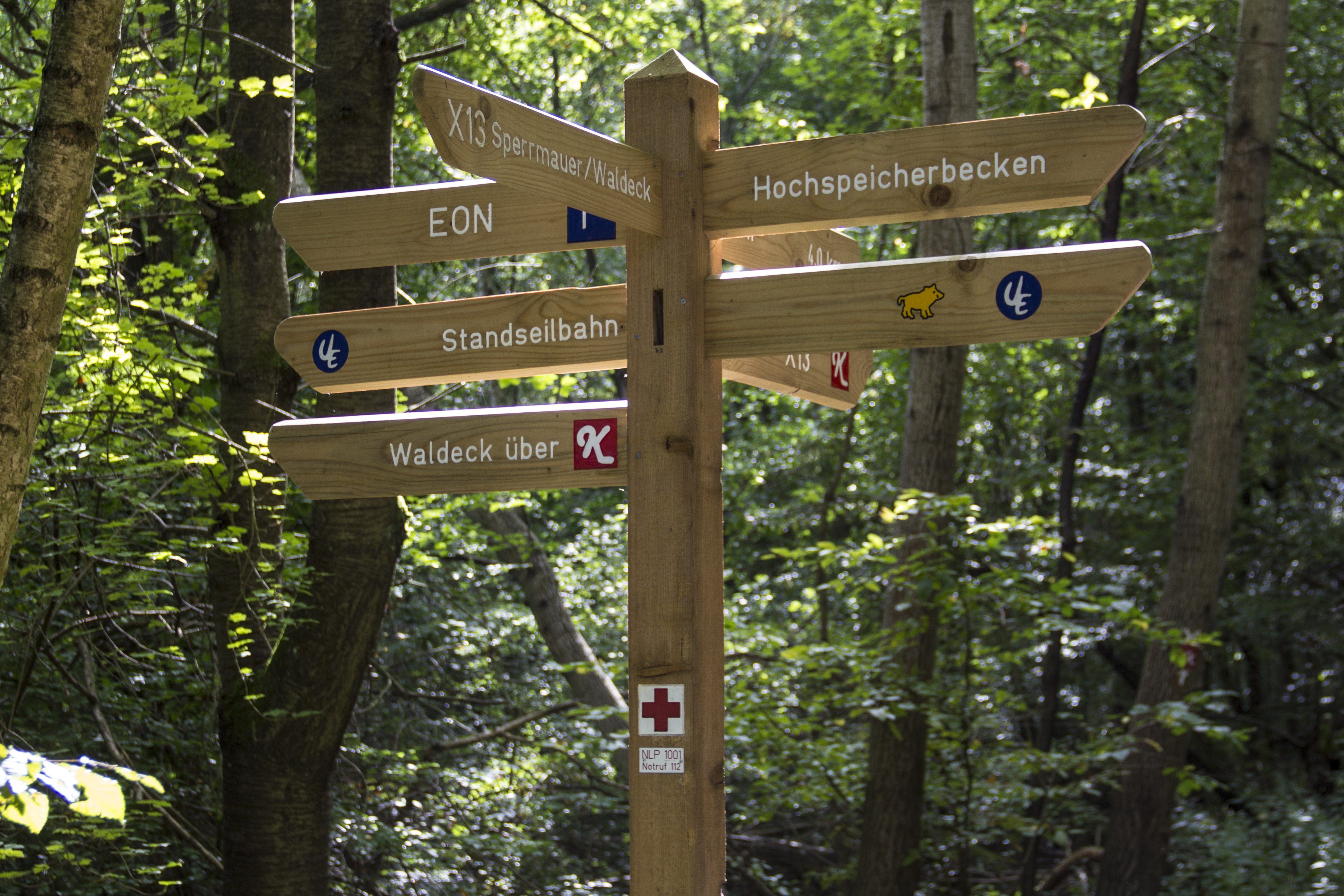 Ein Wegweiser im Nationalpark Kellerwald-Edersee (Landkreis Waldeck-Frankenberg, Hessen, Deutschland)